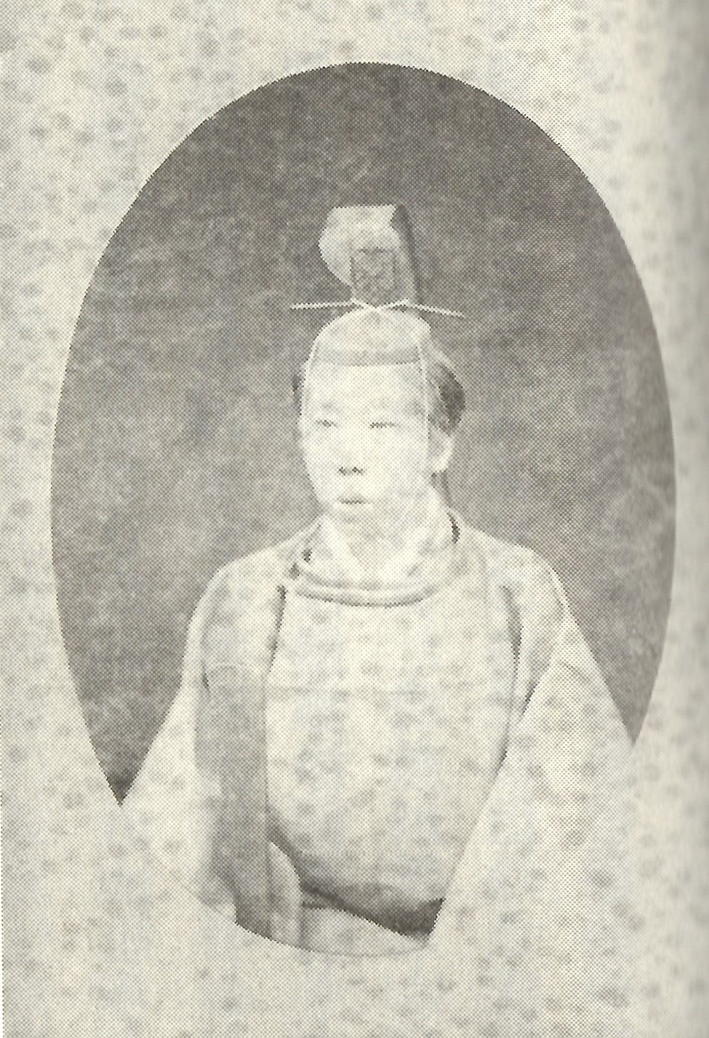 水谷川忠起の肖像写真。